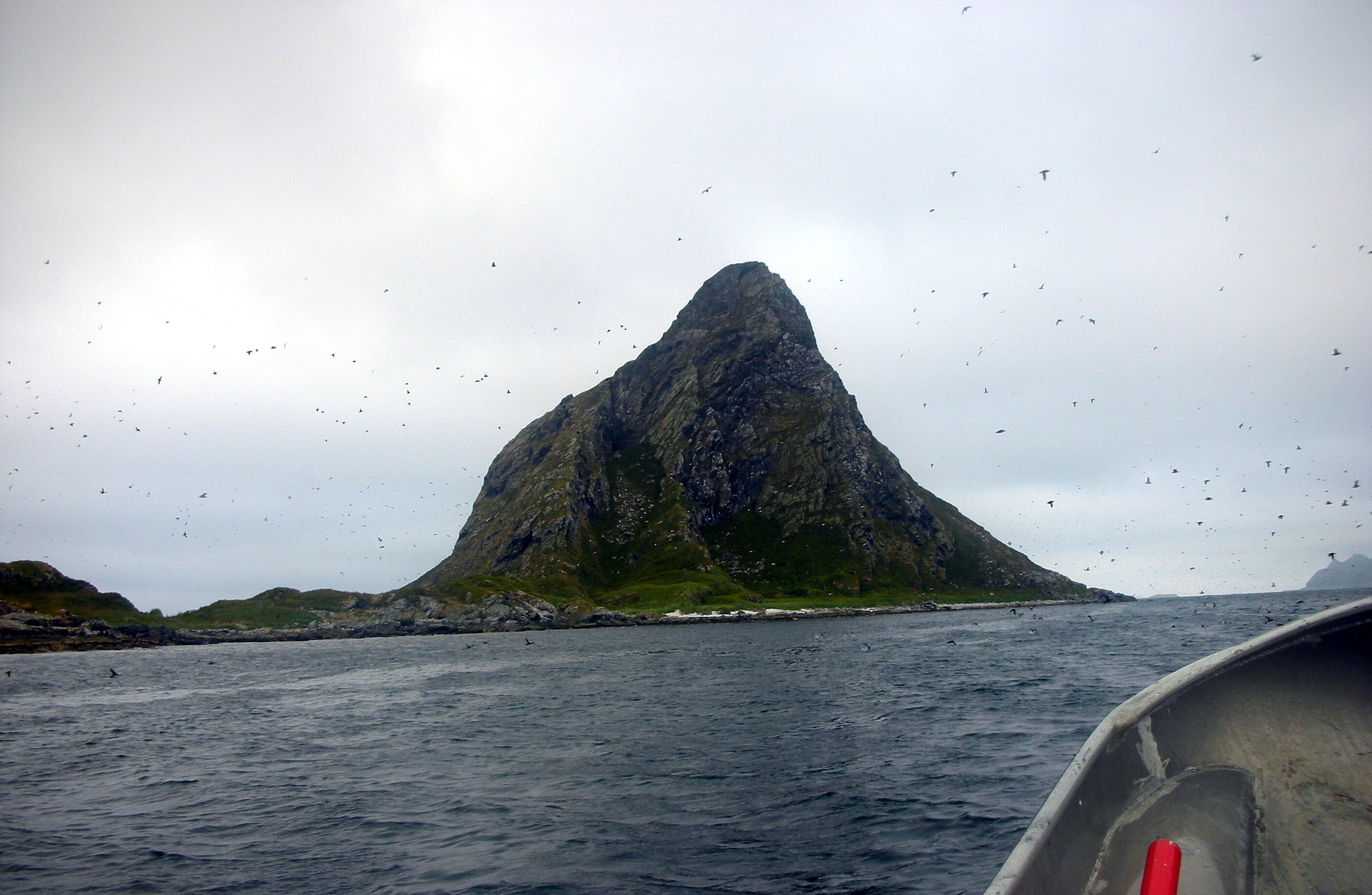 Bleiksøya in Andøy, Nordland, Norway